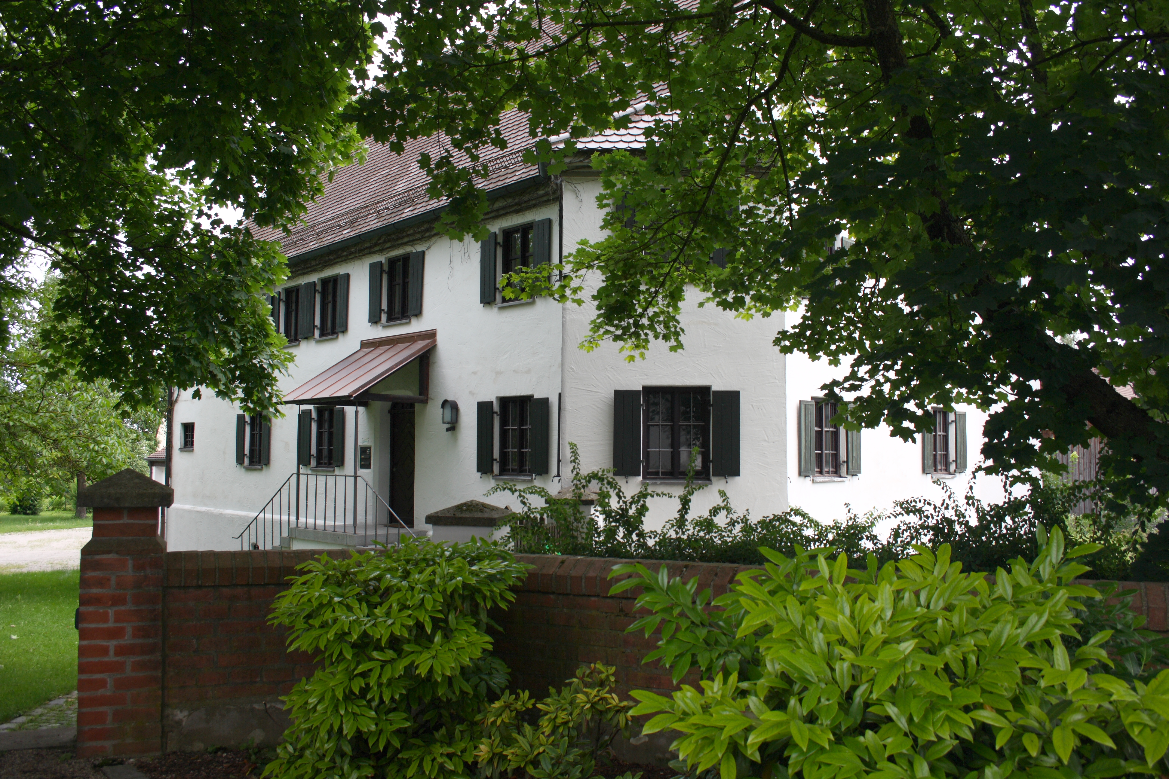 katholisches Pfarrhaus in Altenmünster im Landkreis Augsburg (Bayern), Rathausplatz 2